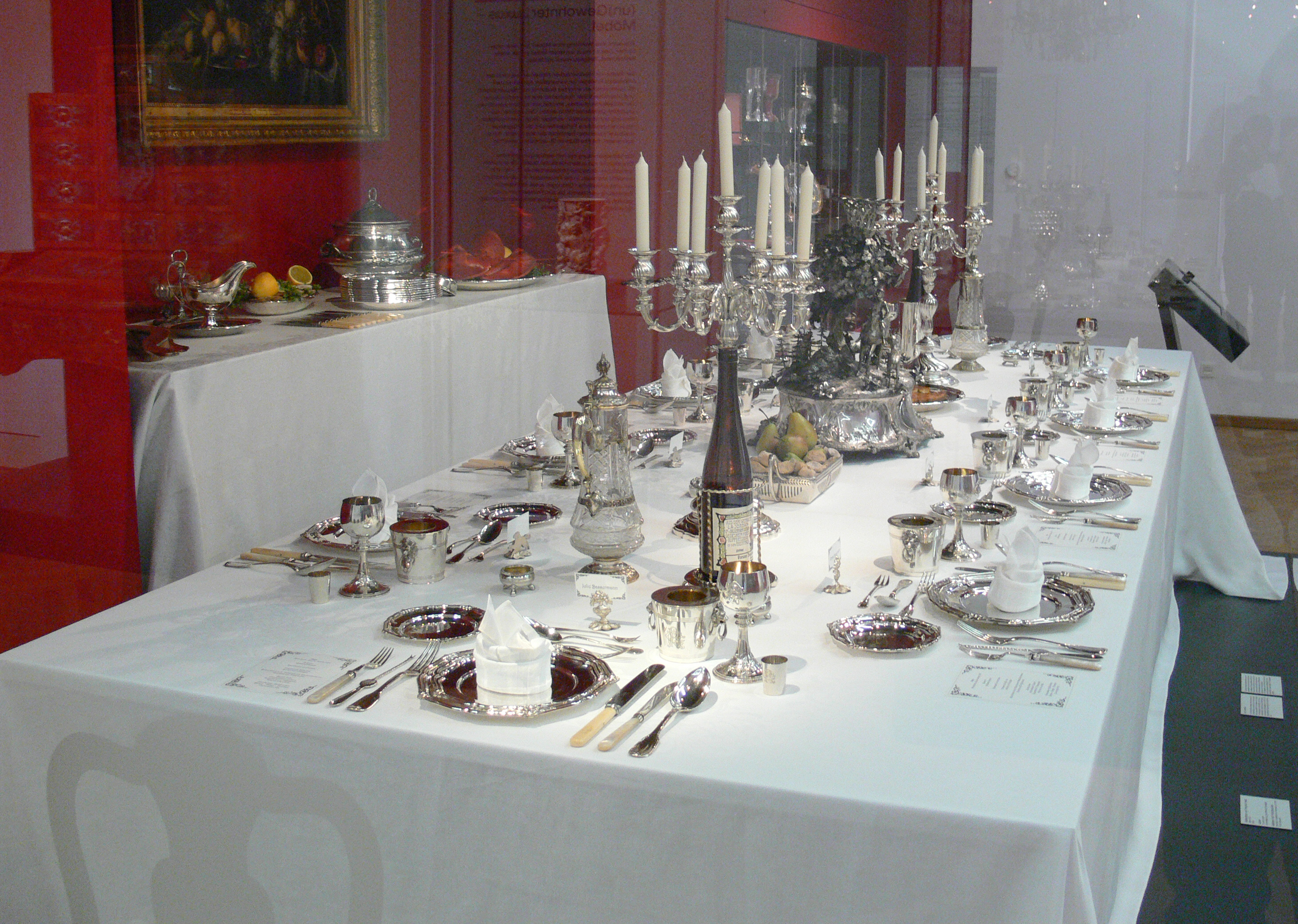 Silbertafel der Geschwister Carl und Anna Reiß, c. 1000 pieces, various German manufacturers, after 1888 Gallery: Zeughaus, Reiss-Engelhorn-Museen, Mannheim